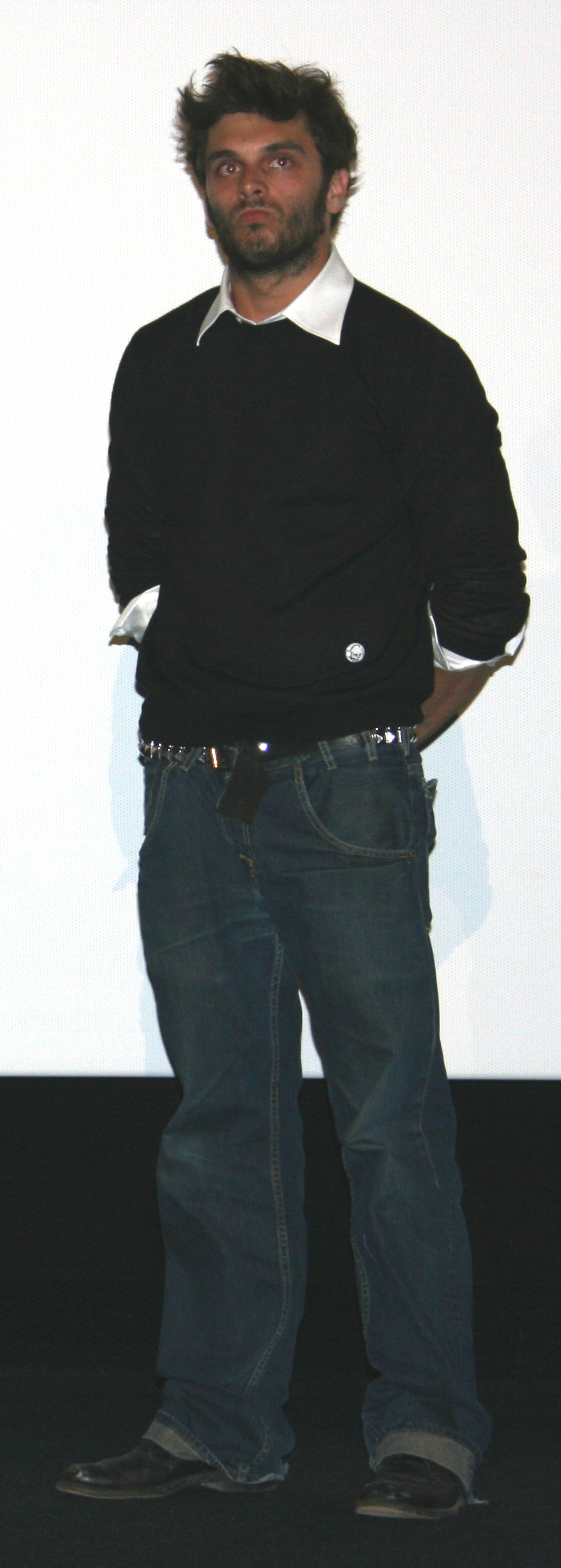 Pio Marmaï à l'avant-première du Premier jour du reste de ta vie diffusée à l'UGC Ciné Cité Bercy, à Paris.